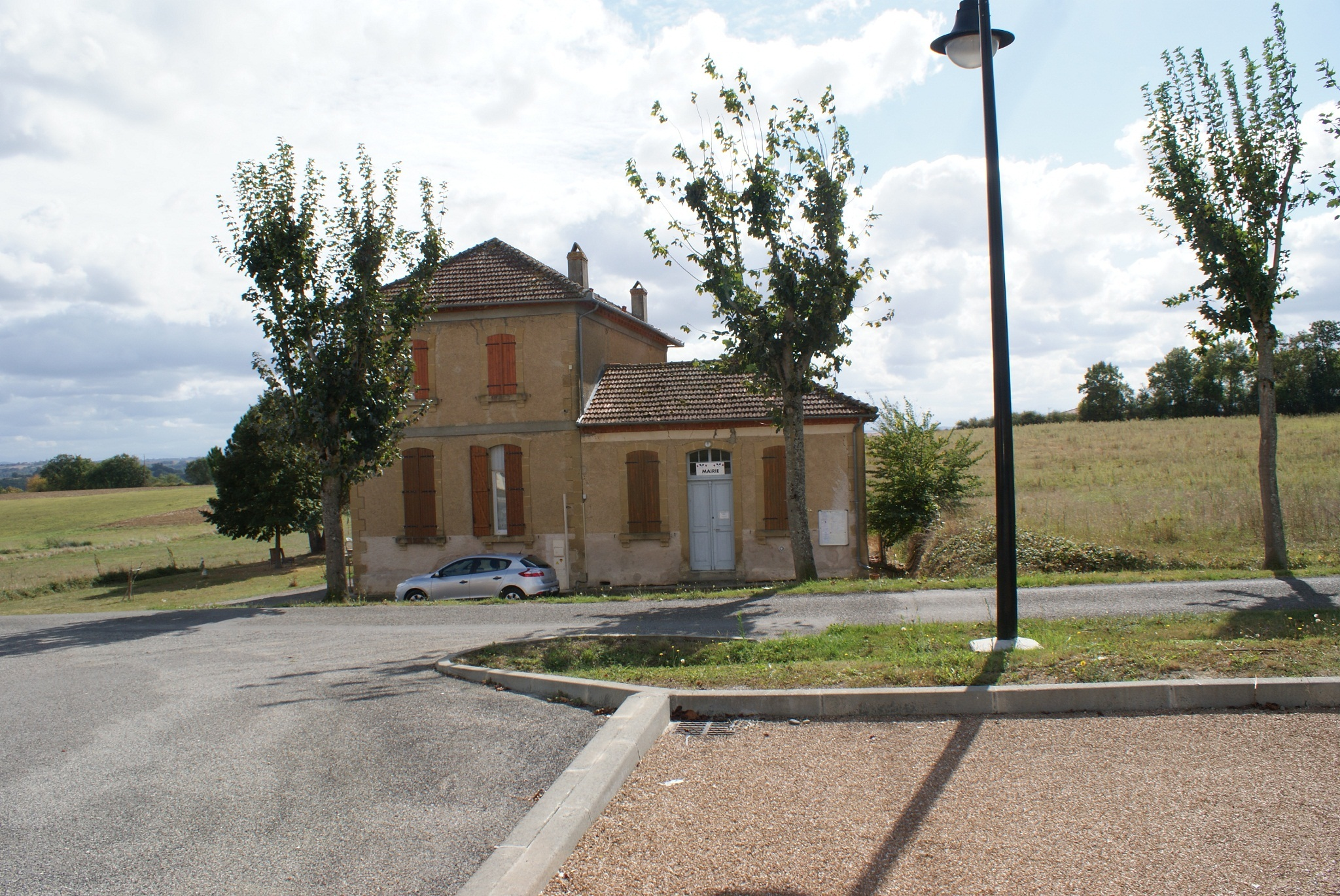 Het gemeentehuis.